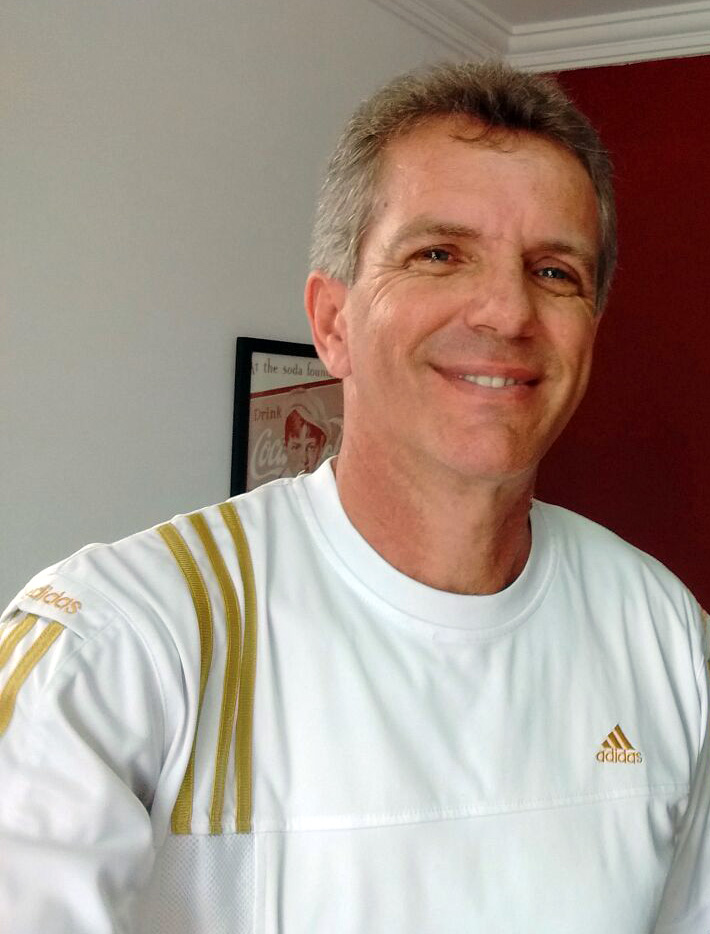 Ronaldo Moraes